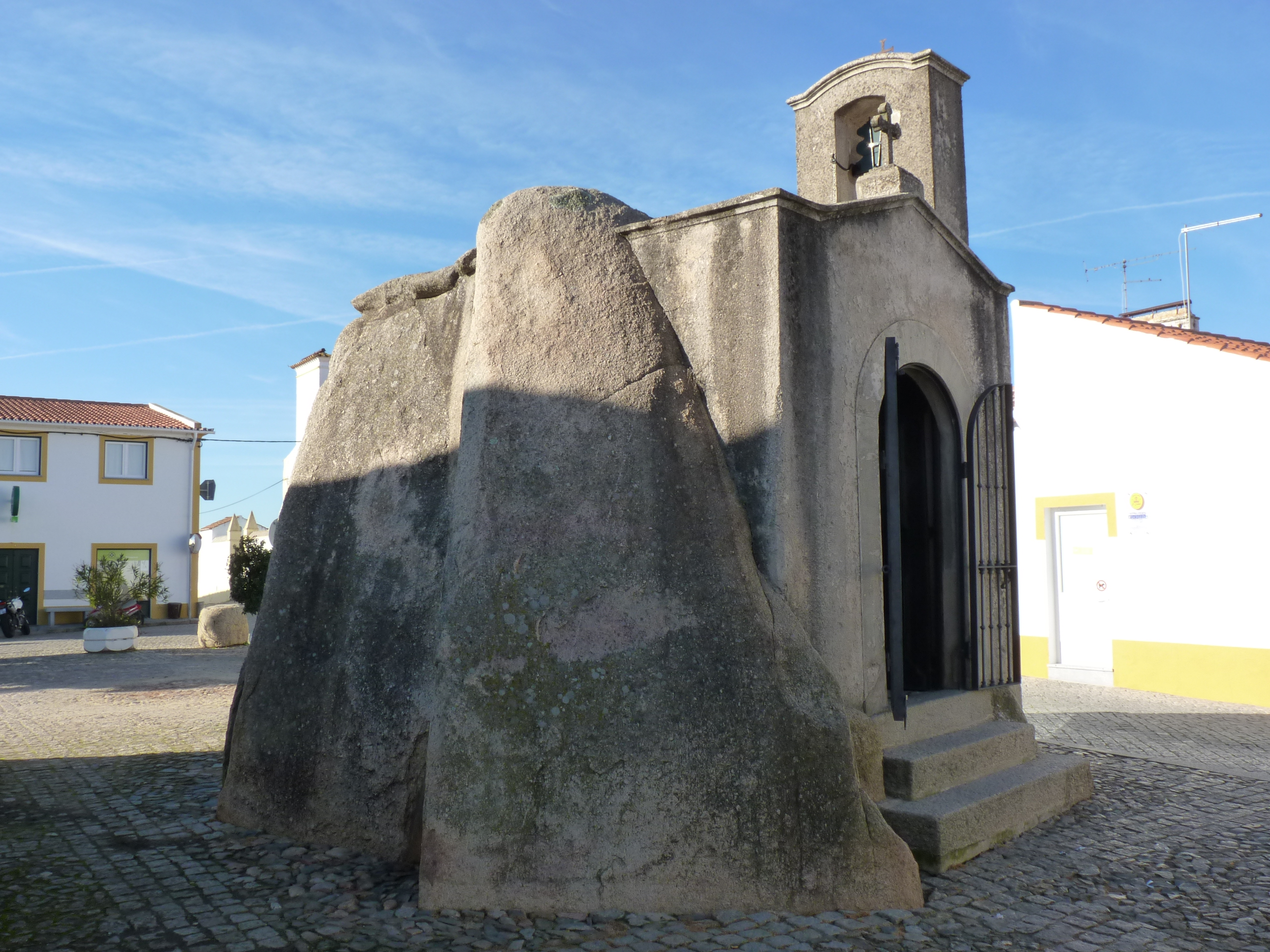 Anta de Pavia This file was uploaded for Wiki Loves Monuments in Portugal with the unique identifier 70422.